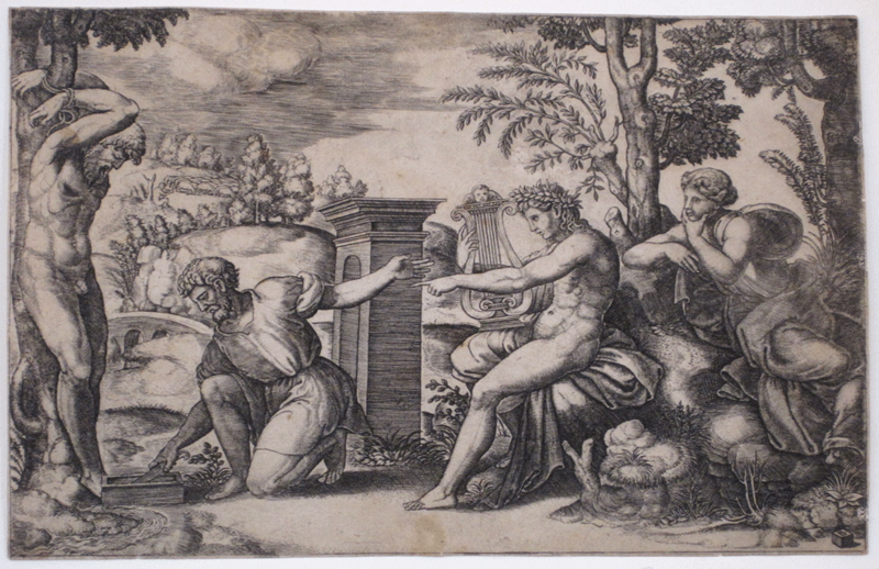 Apollon et Marsyas, 18 x 28,2 cm